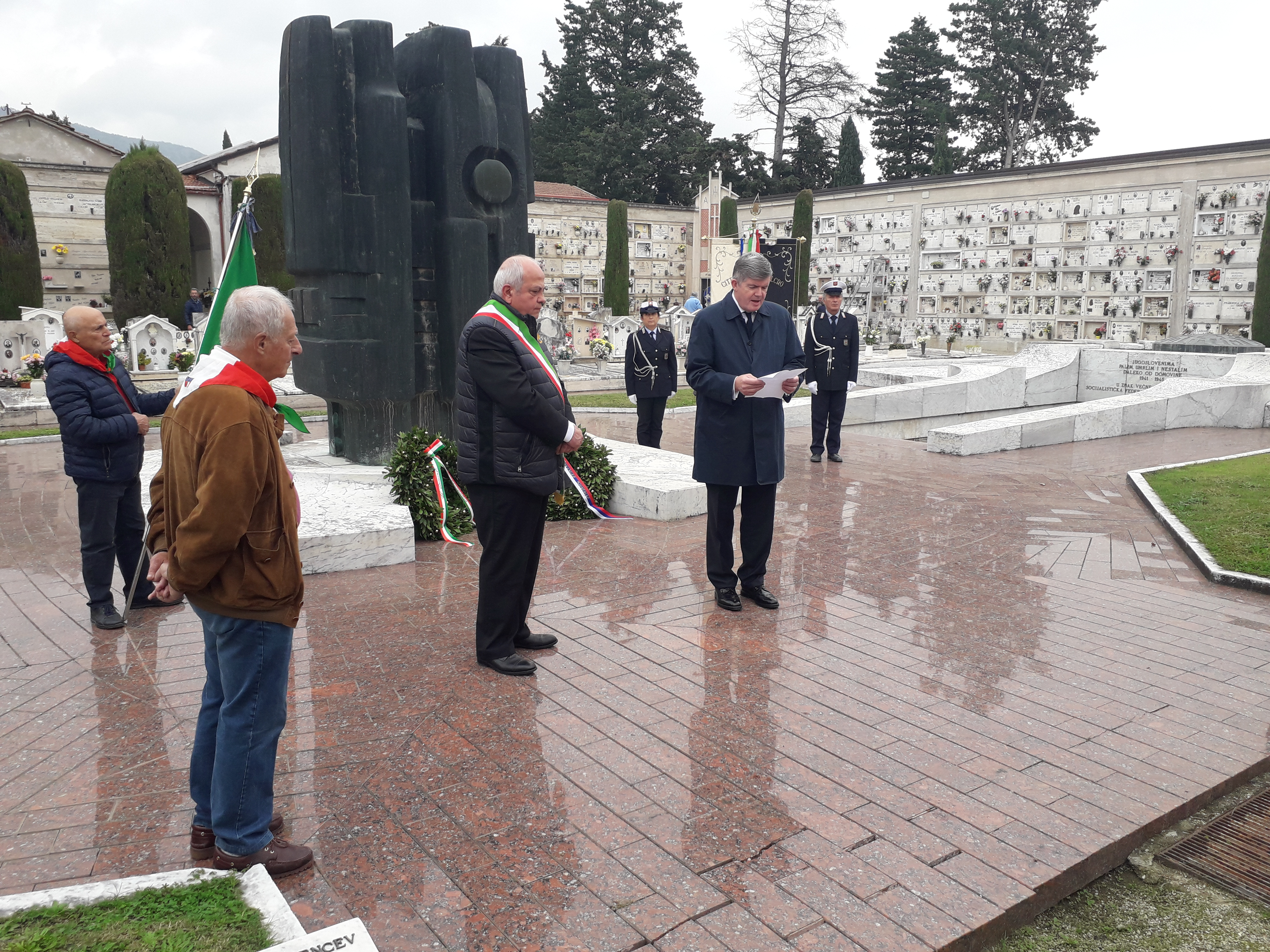 Cerimonia commemorativa presso il Sacrario degli Slavi di Sansepolcro con il sindaco di Sansepolcro Mauro Cornioli e l'ambasciatore sloveno in Italia Tomaž Kunstelj.